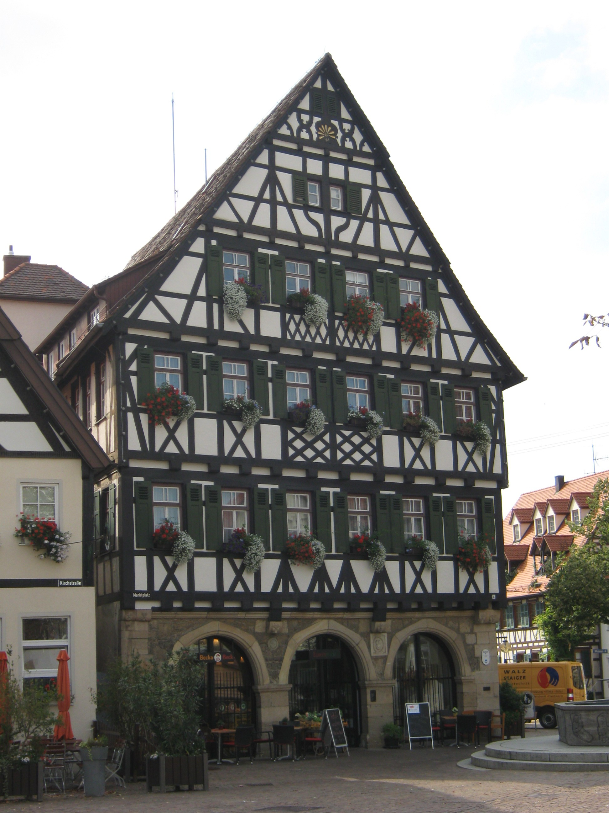 Das Gebäude des Rathaus II am Marktplatz in Pfullingen wurde 1686 im Hinblick auf die Stadterhebung 1699 als Fleckenhaus sowie Kauf- und Kornhaus erbaut. Die drei Bogentore unter dem barocken Sichtfachwerk waren der Eingang der offenen Halle. Ab 1764 Nutzung als Schulgebäude, seit 1902 als Rathaus.